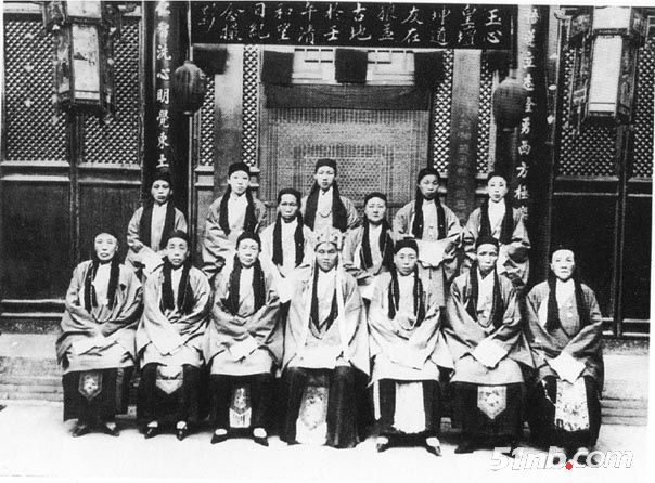 紅燈照的領袖黃蓮聖母和諸仙姑仙女